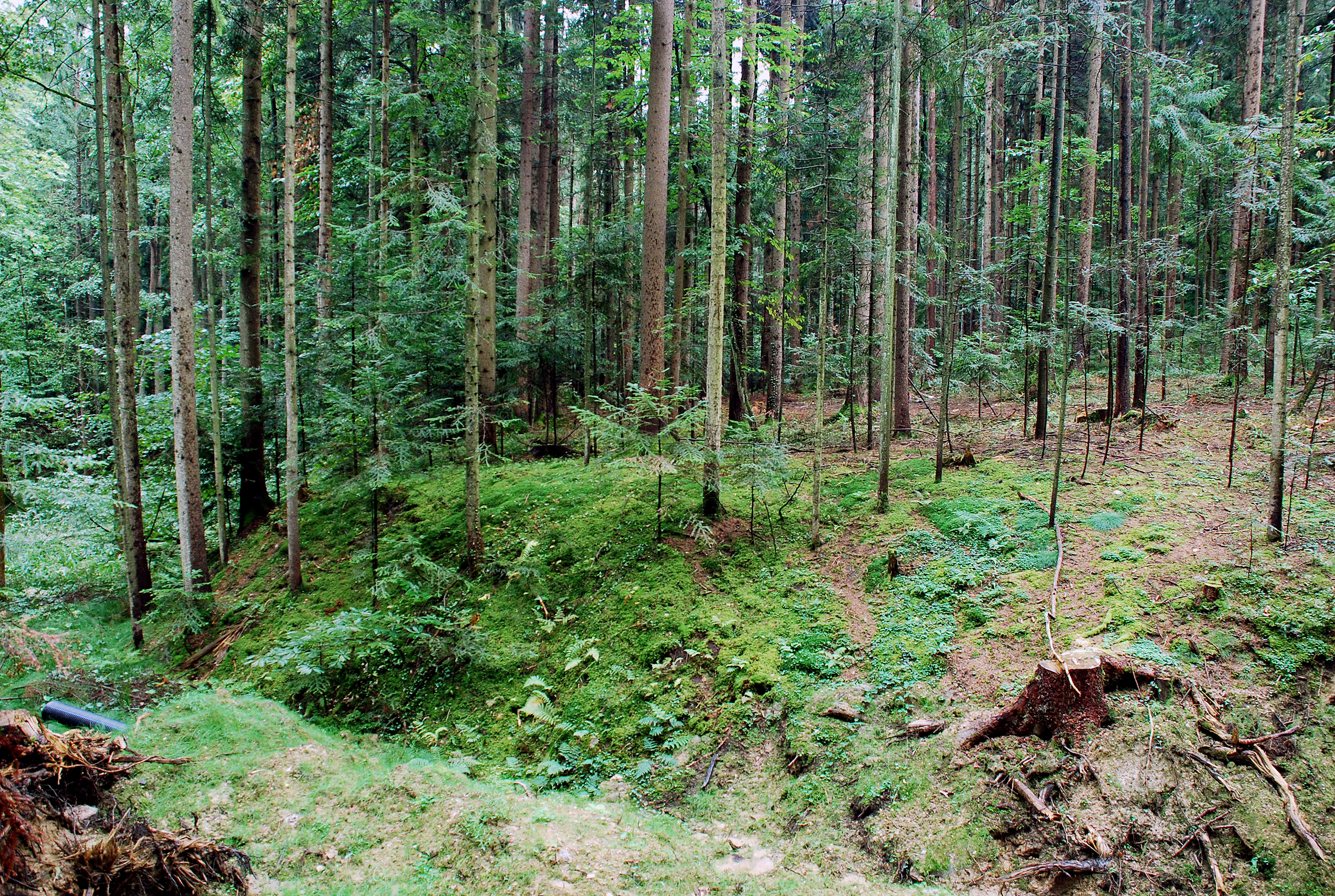 Gelände der ehemaligen mittelalterlichen Burg Lemsitz, Gemeinde St Stefan ob Stainz, Steiermark, Österreich. Es sind nur mehr Bodenunebenheiten und Verebnungen im bewaldeten Gelände erkennbar, es stehen keine Mauern mehr